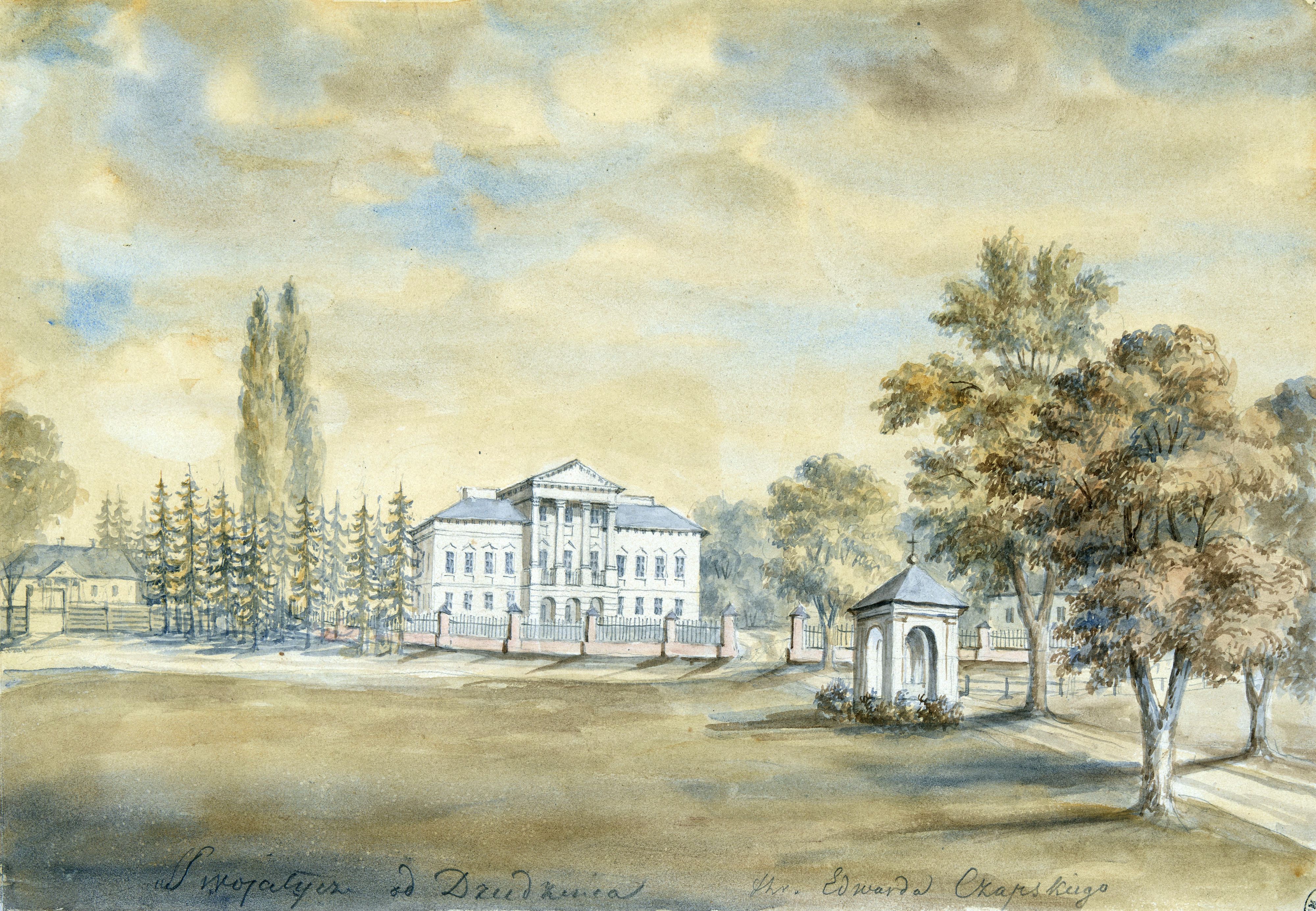 Беларуская (тарашкевіца): Сваятычы (Svajatyčy), сядзіба Чапскіх (Čapski)